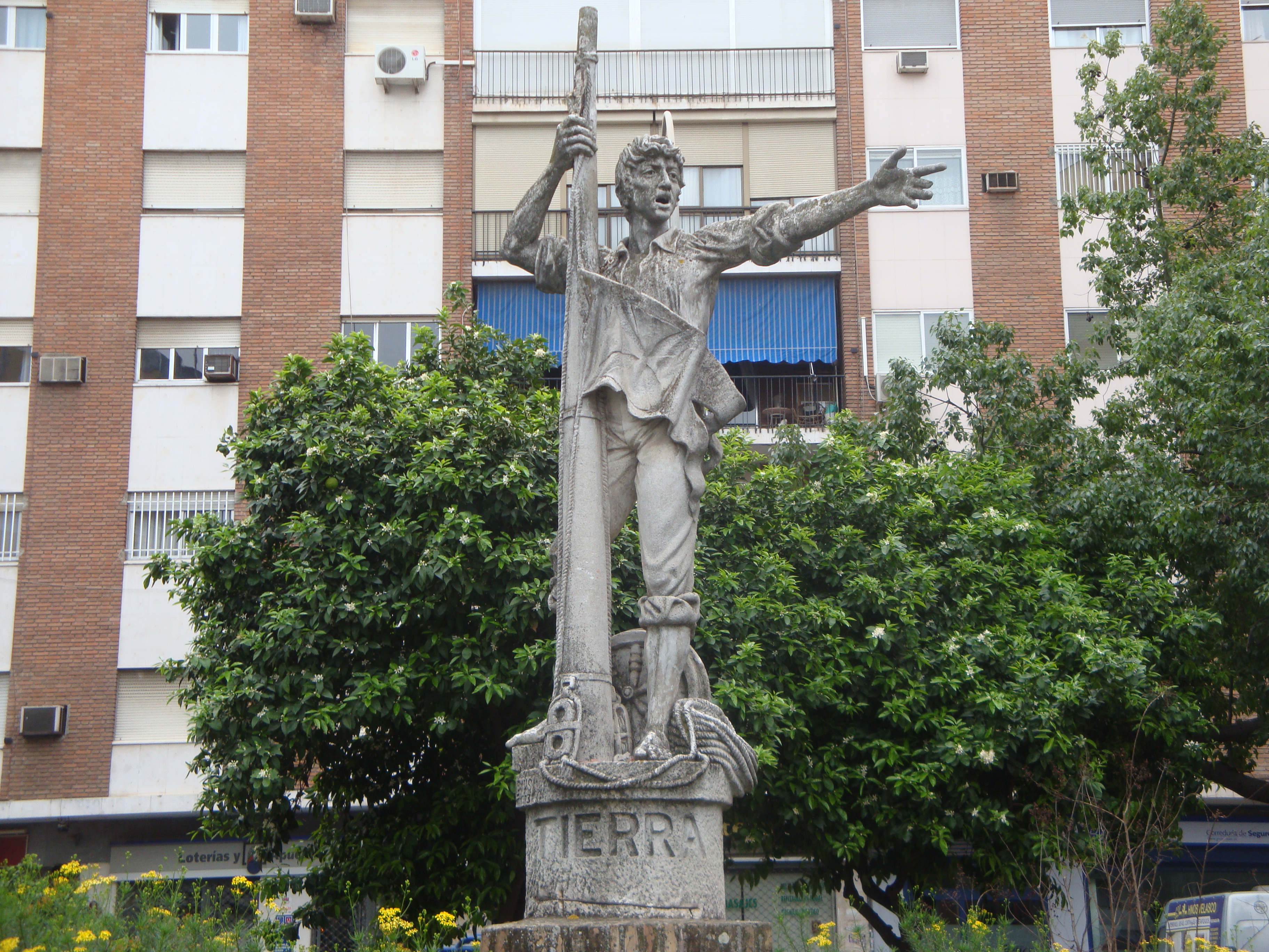 Estatua dedicada a Rodrigo de Triana ubicada en la calle Pagés del Corro de Sevilla